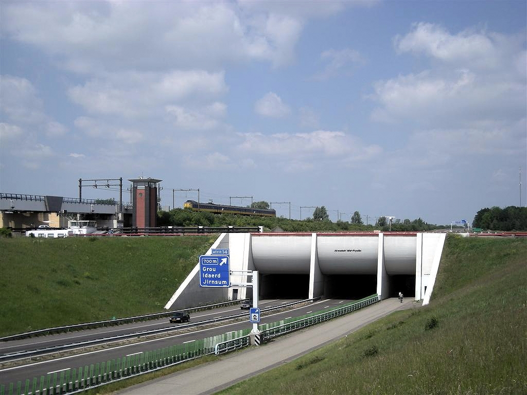 Aquaduct /tunnel Mid-Fryslan in de A32 onder het Prinses Margrietkanaal bij Grou